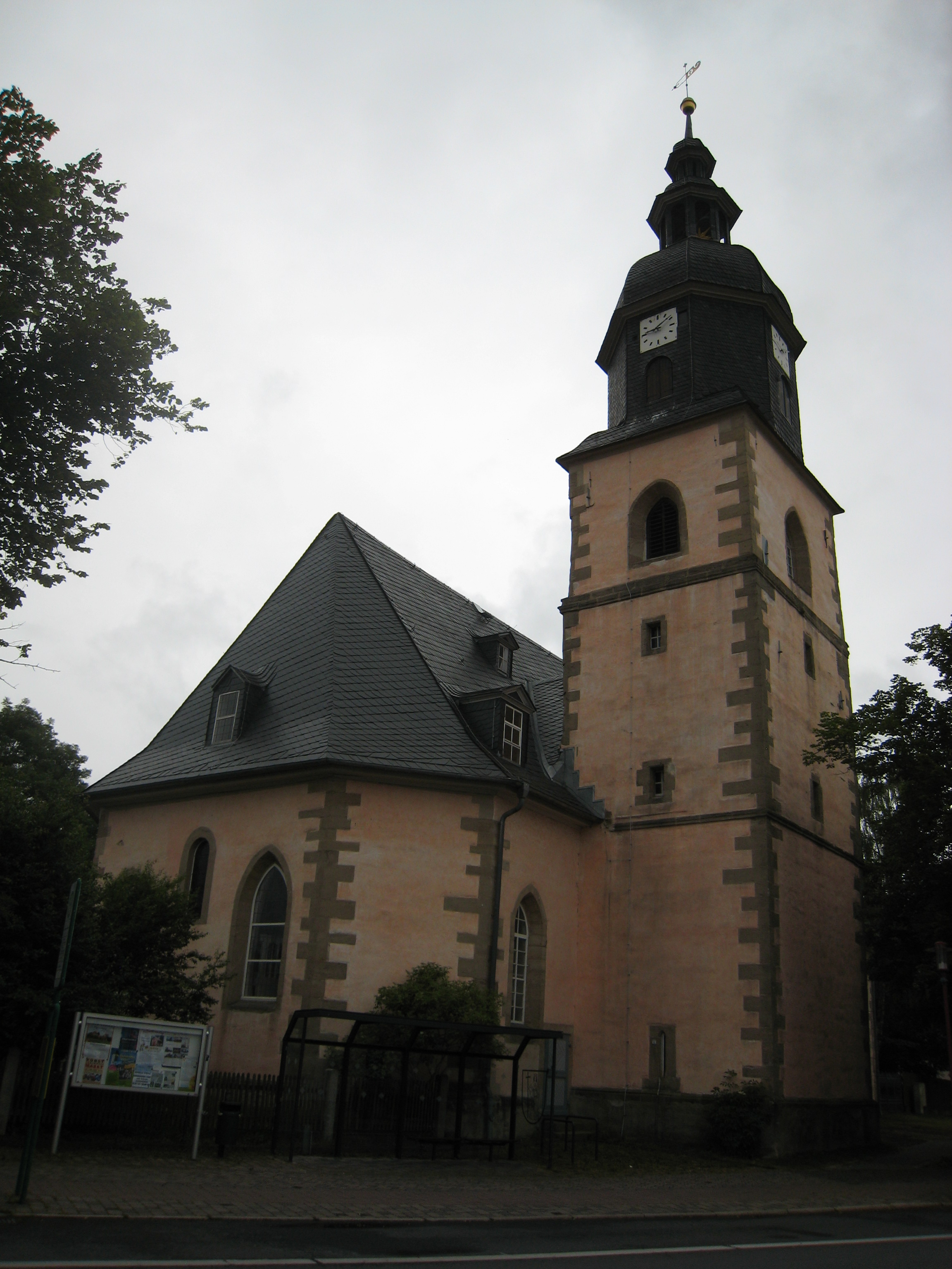 Äußeres der Liebfrauenkirche von Langewiesen